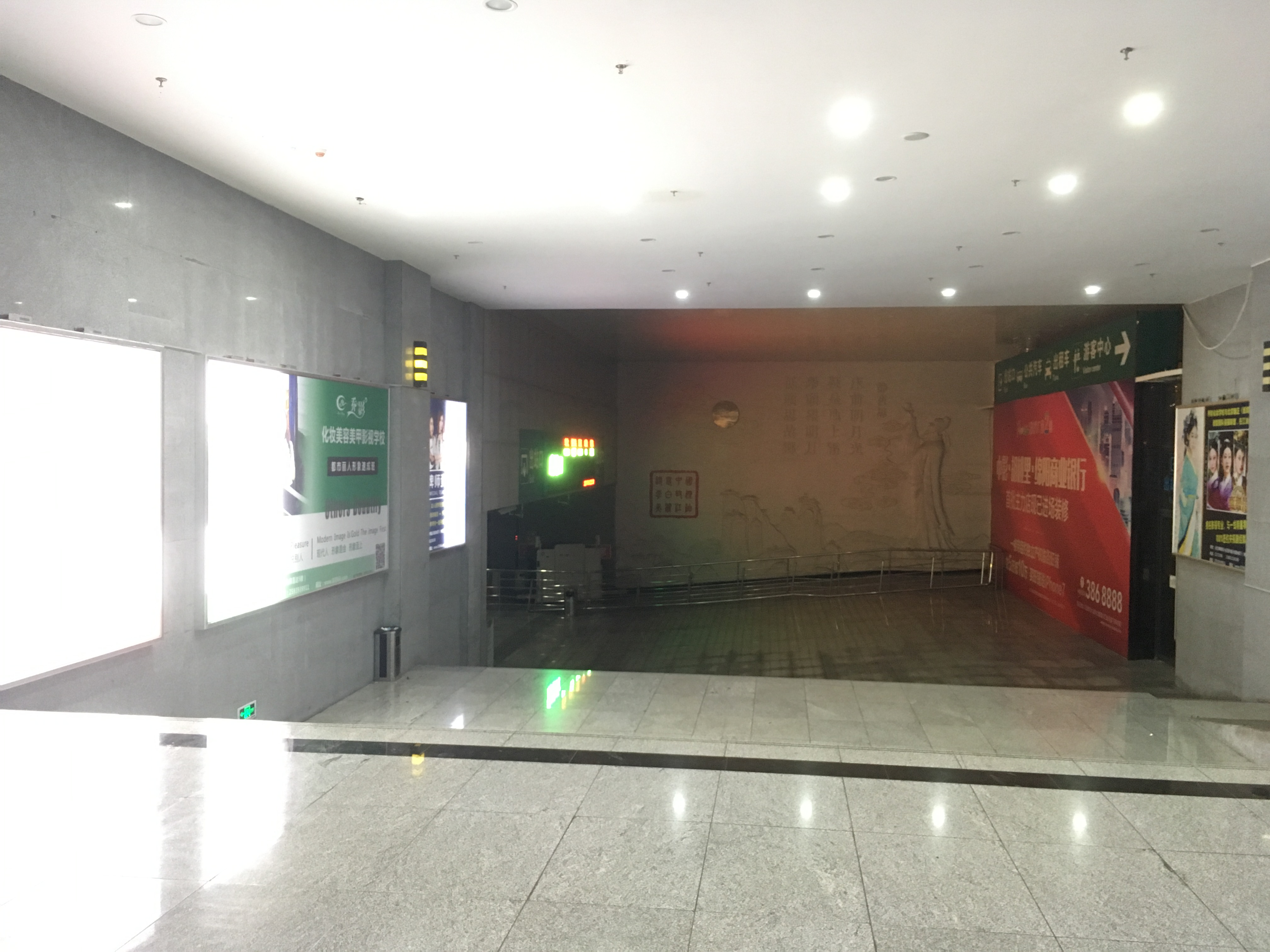 iphone se拍摄